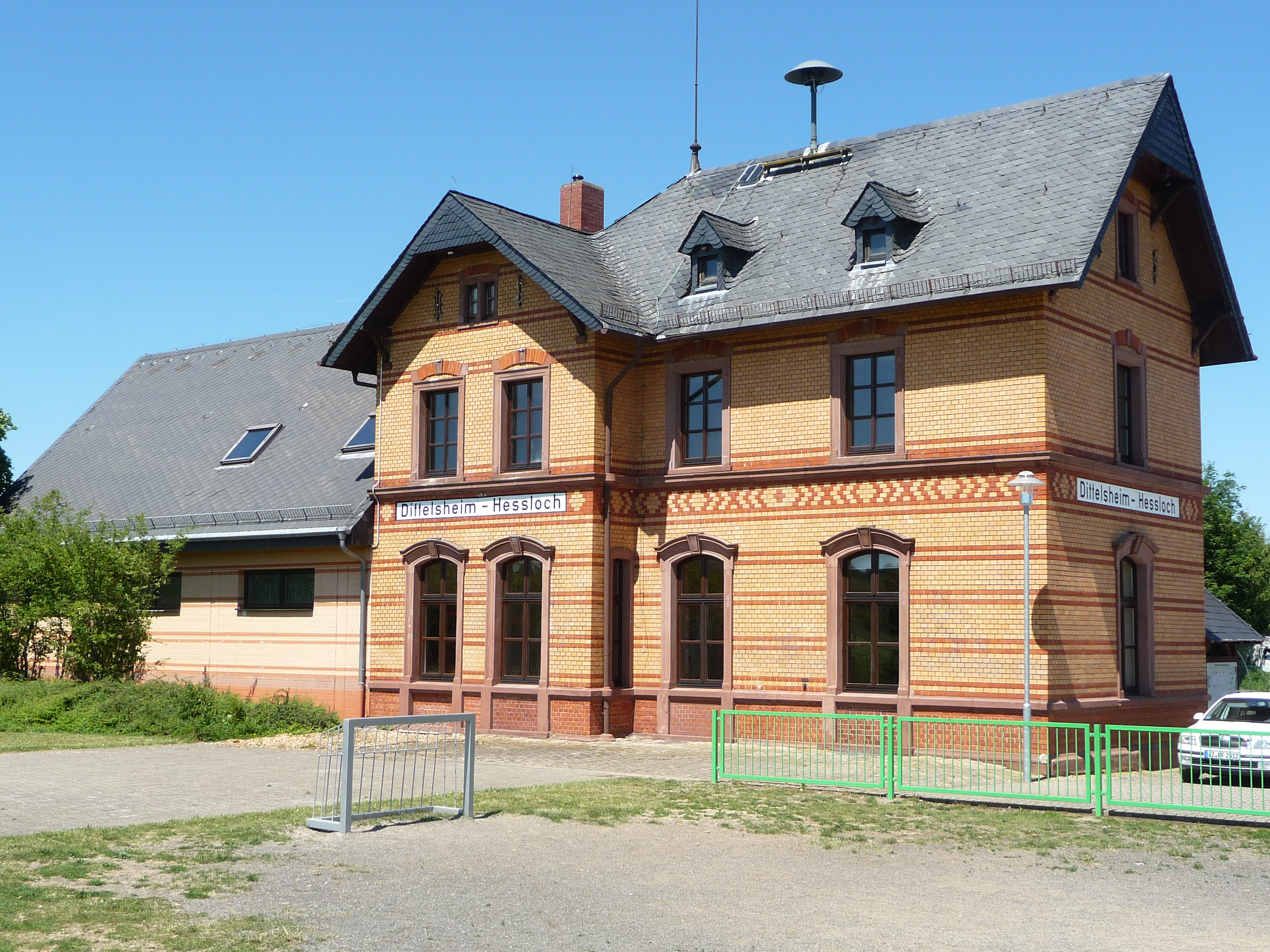 Dittelsheim-Heßloch ist eine Ortsgemeinde im Landkreis Alzey-Worms in Rheinland-Pfalz.